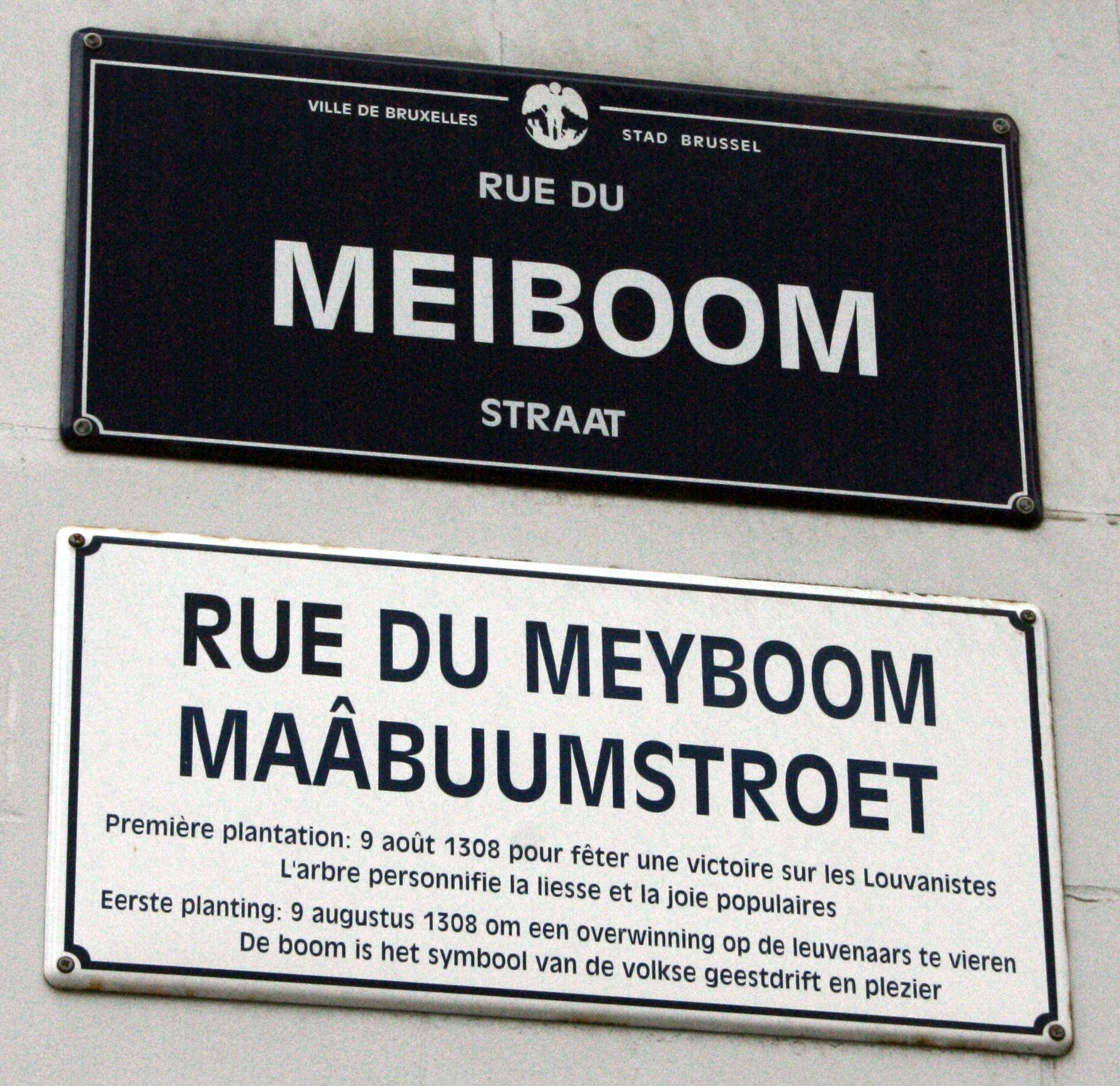 Rue du Meiboom, Bruxelles (belgique). Plaque commémorative